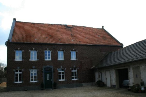 Denkmal Nr. 97 in Heinsberg-Kempen